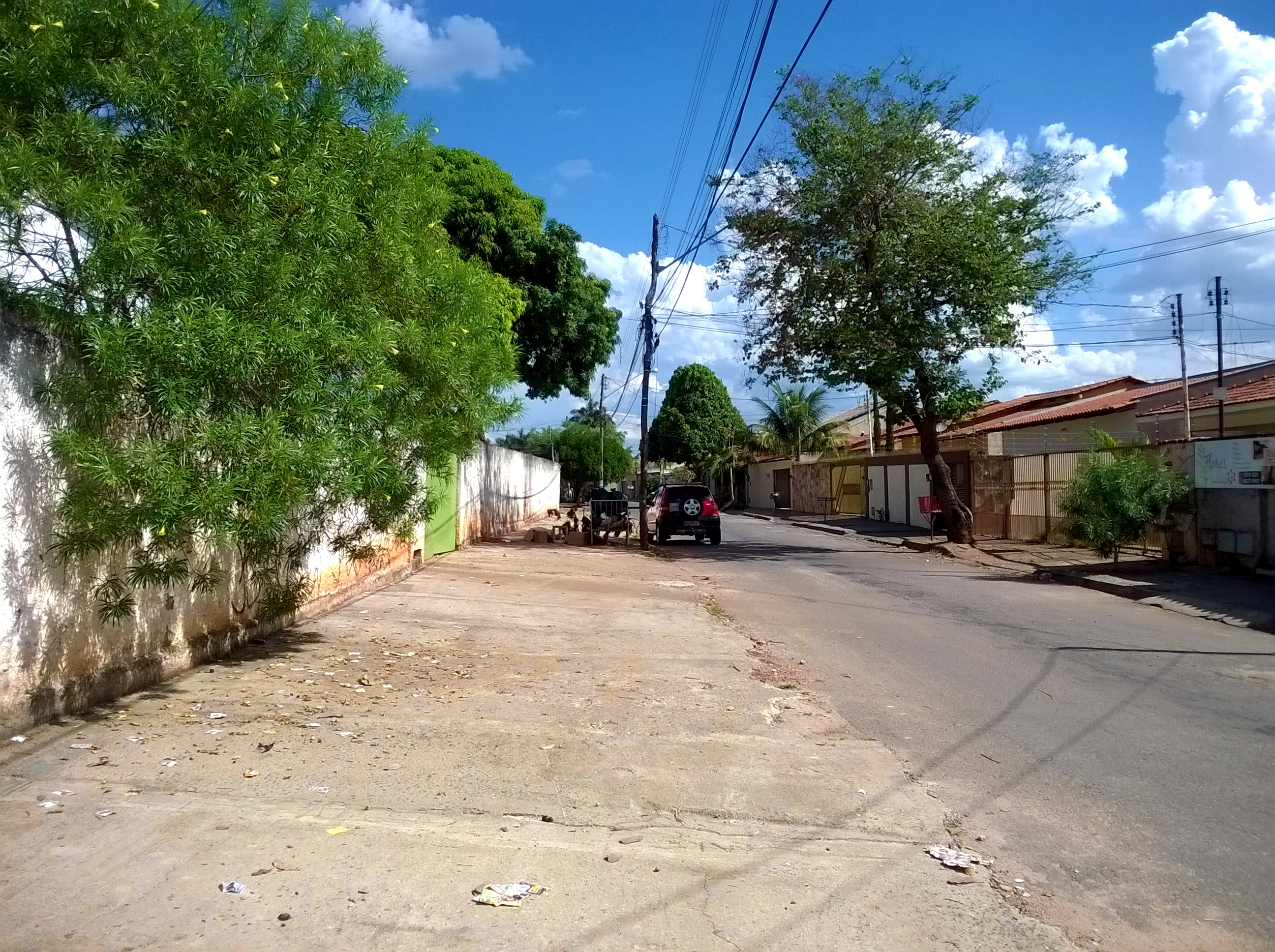 Rua Holanda, no Jardim Europa em Goiânia, 10 de outubro de 2016.